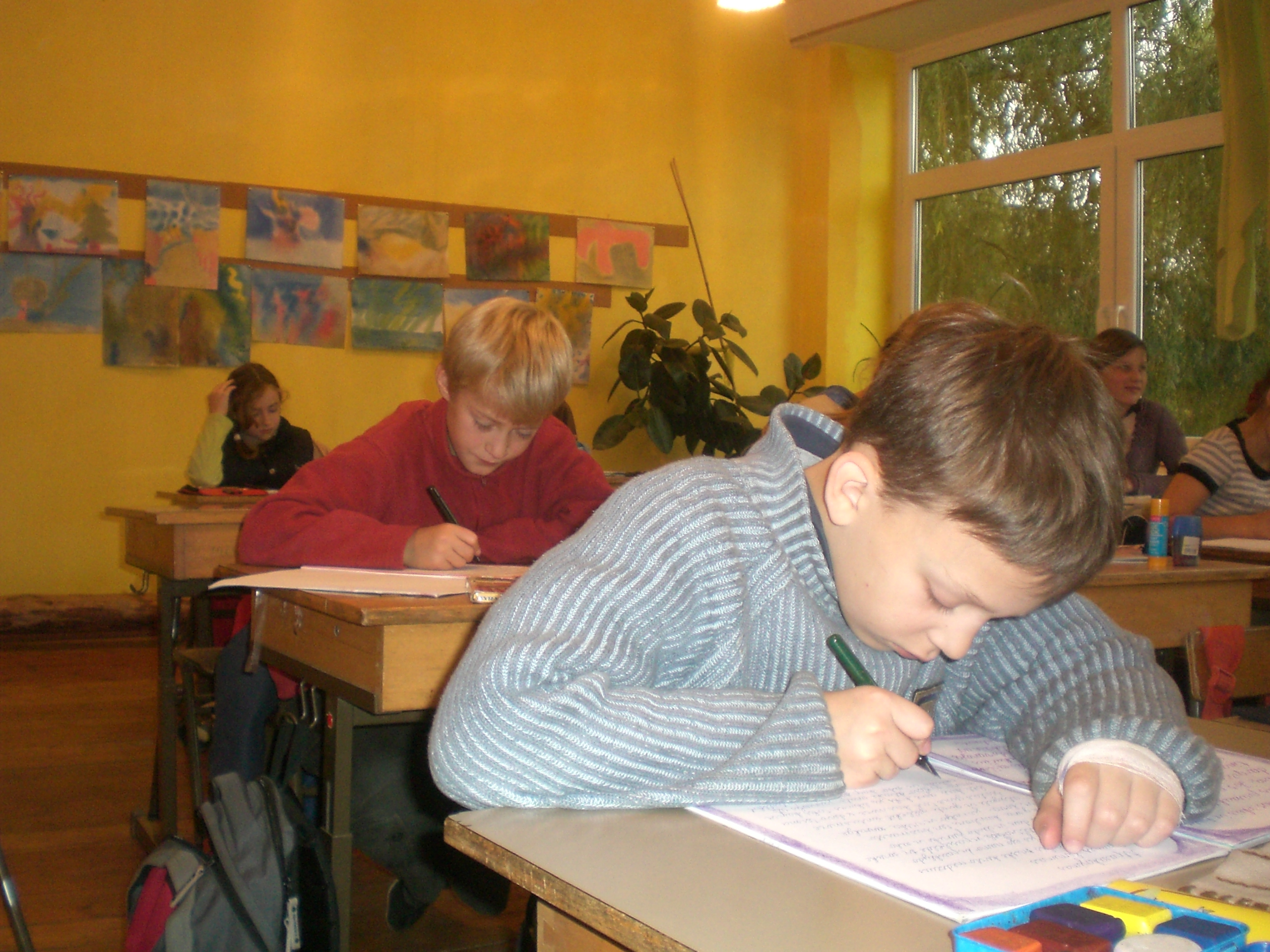 la 4-a klaso de valdorfa lernejo en Kaŭno (Litovio) Fonto: propra foto